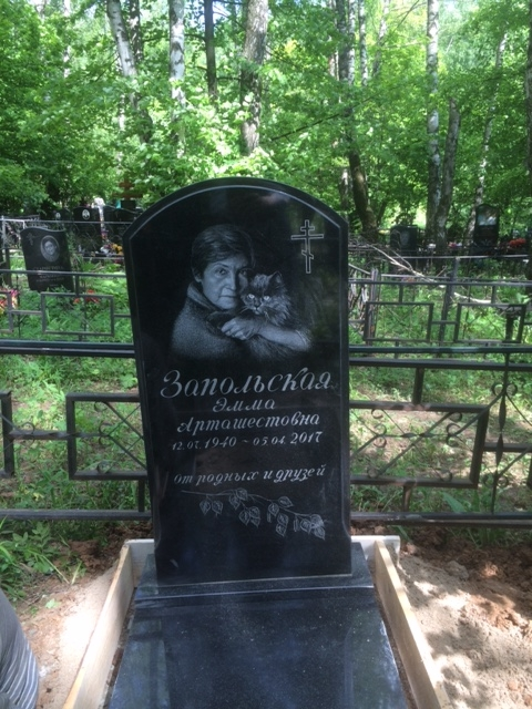 Эмма Арташесовна Атовмьян (надгробие)